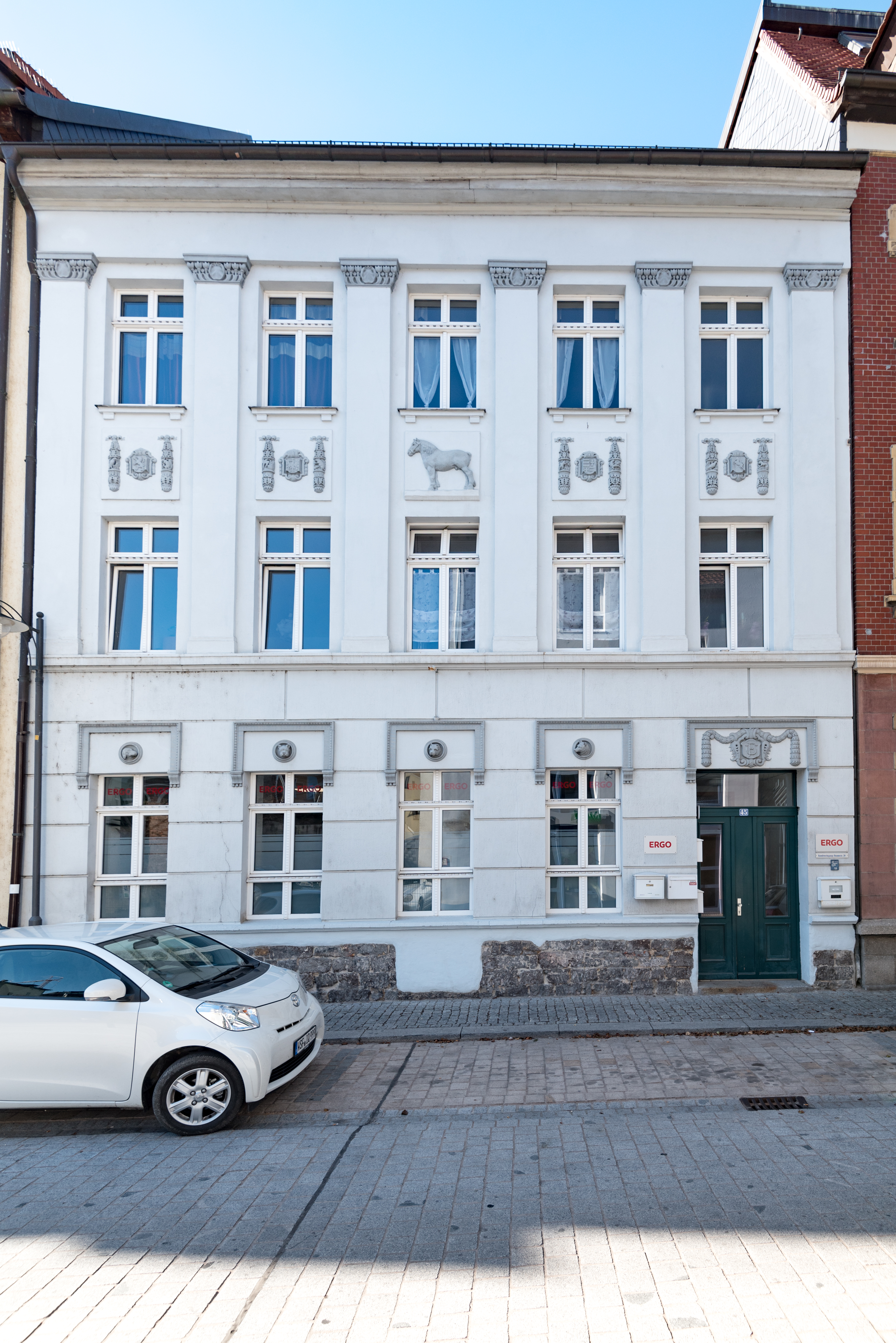 Weißenfels, Große Kalandstraße 45